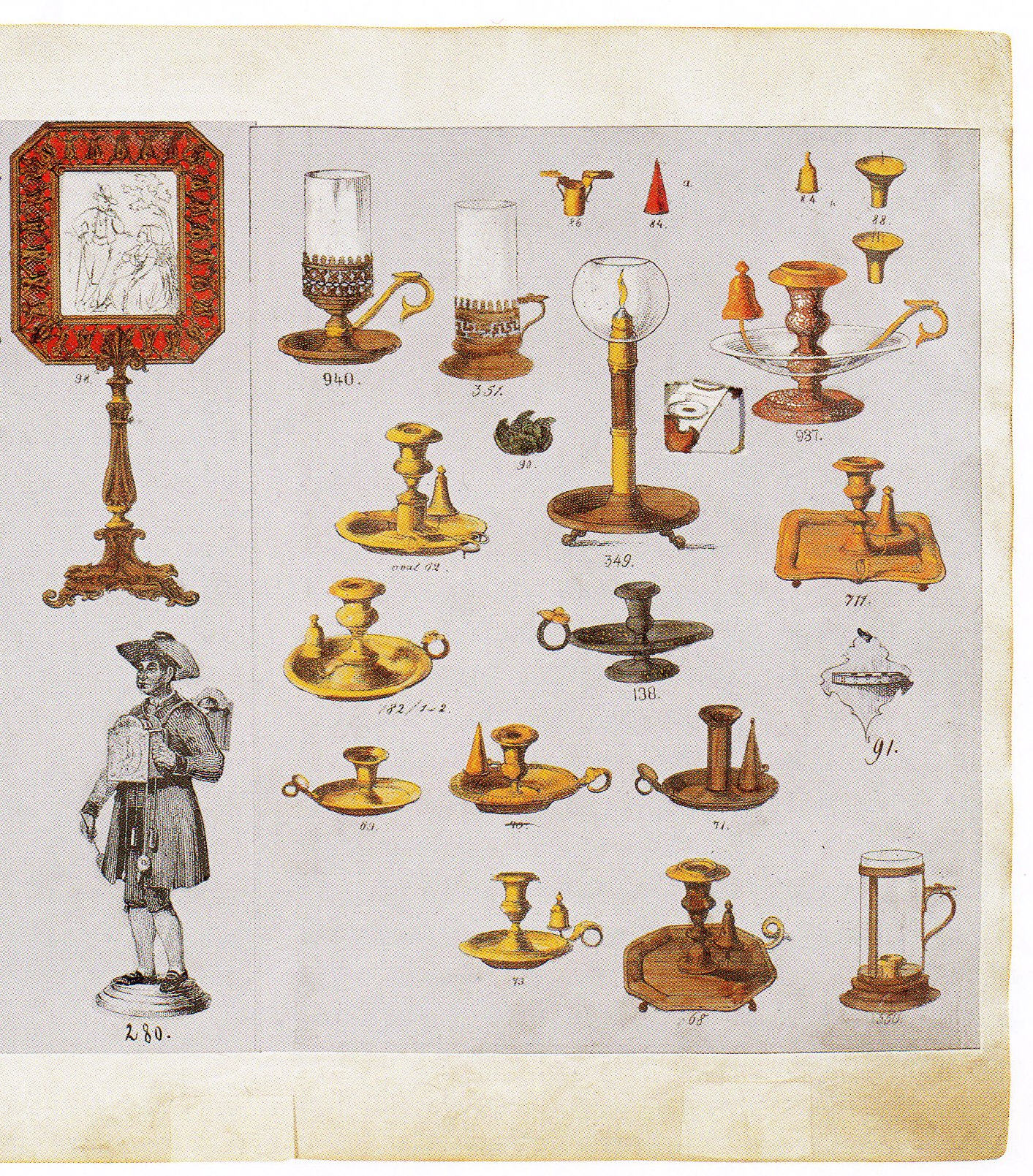 Ausschnitt aus einem Musterbuch der Firma C. Deffner. Kerzenleuchter, Lampen, Lichtschirme, Uhrenmännchen